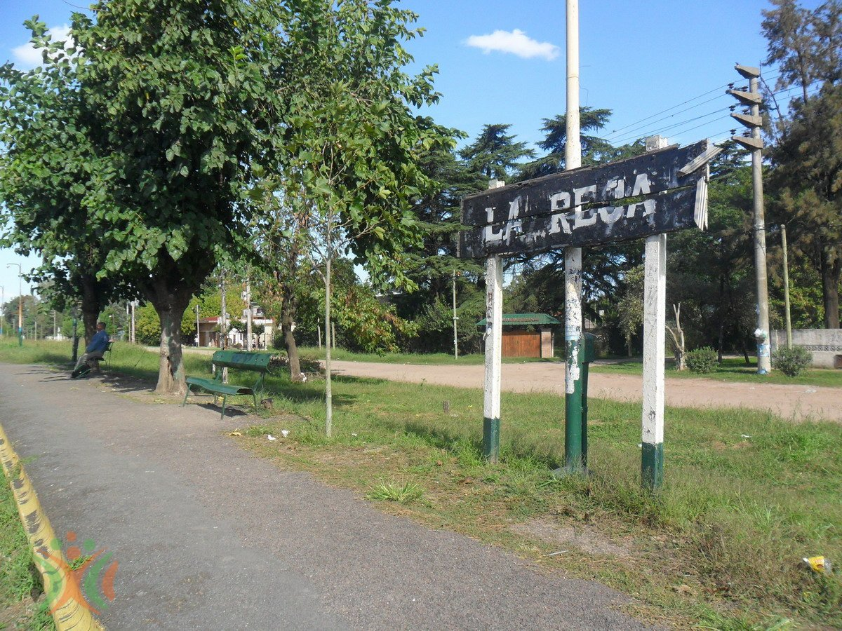 Estacion de La Reja